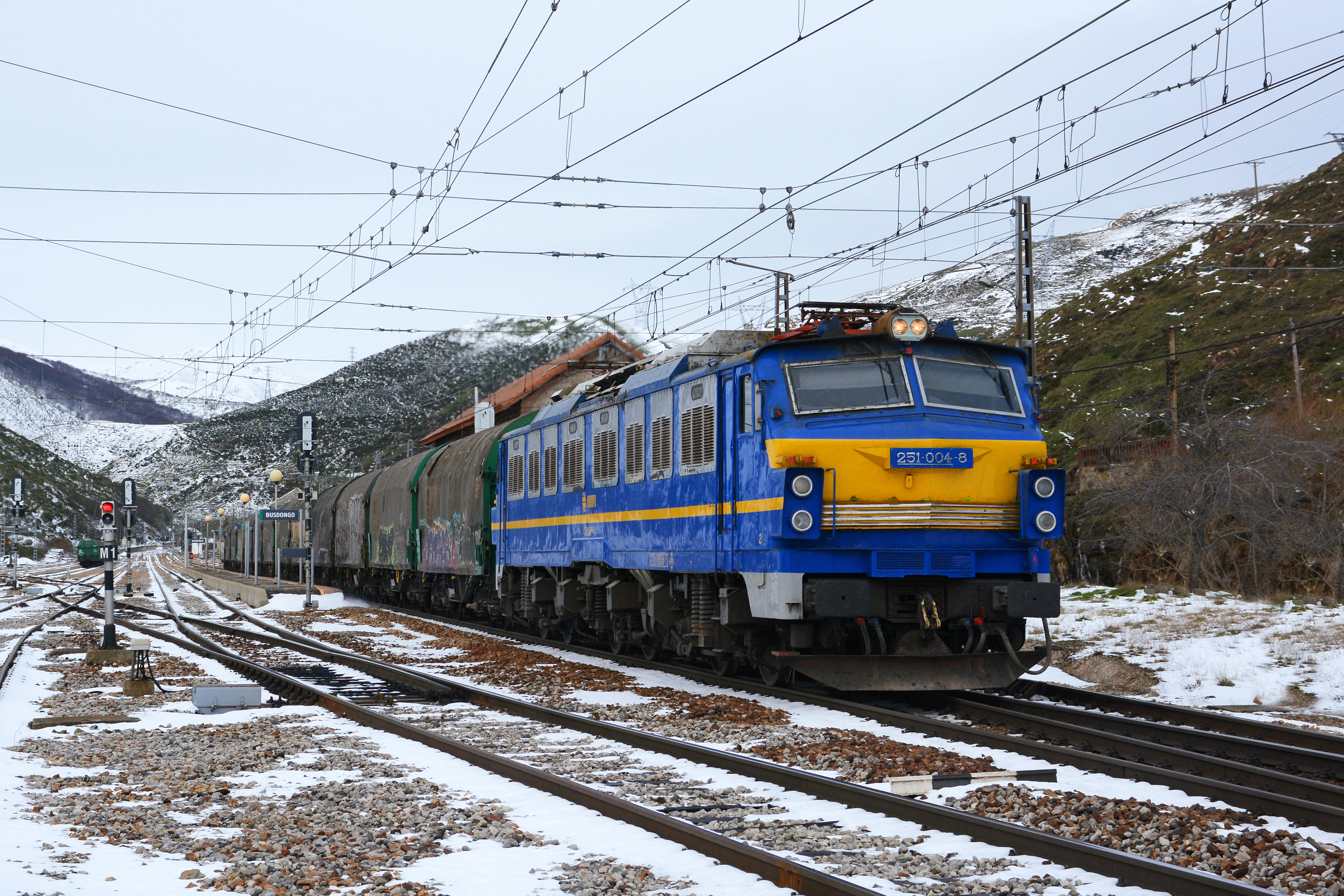 La locomotora 251.004 de Renfe, con un mercancías siderúrgico, en la estación de Busdongo (Villamanín, provincia de León, Castilla y León).